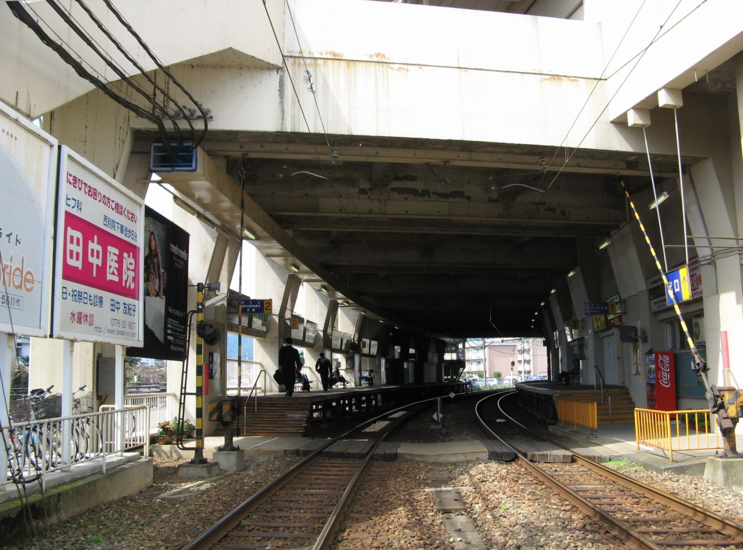 福大前西福井駅構内 踏切から西望